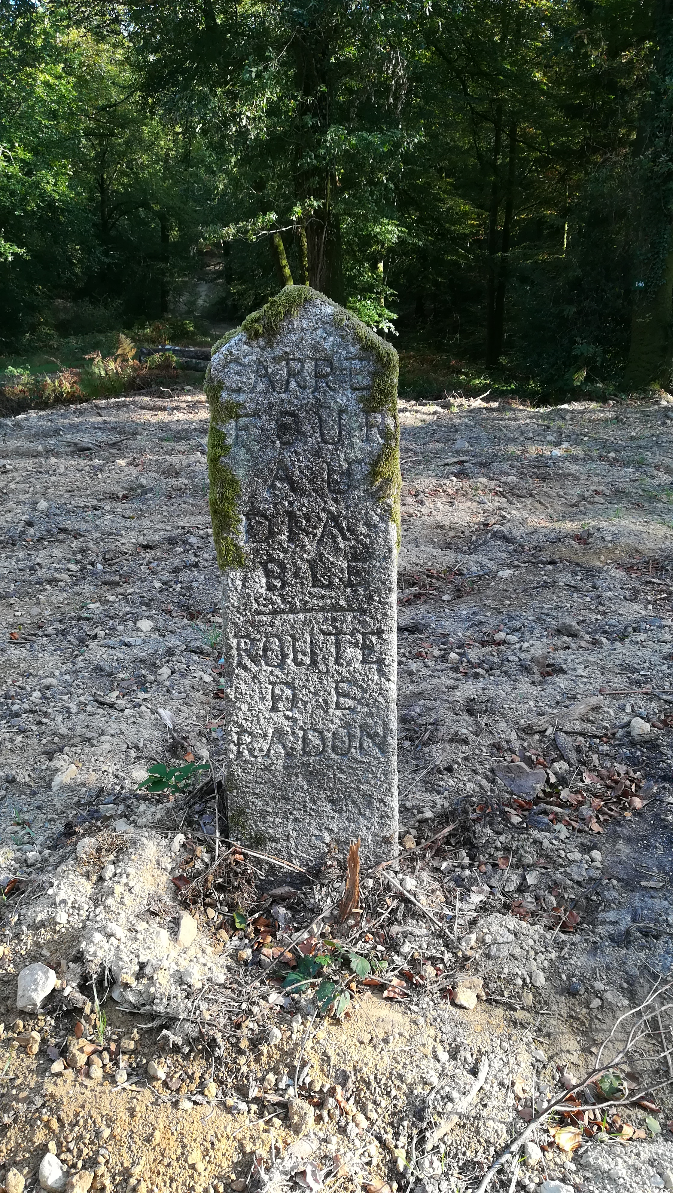 L'une des bornes de la forêt d'Écouves. L'une des quatre bornes situées au "carrefour au diable", sur la route de Radon. Texte de la borne : "Carrefour au diable - Route de Radon".